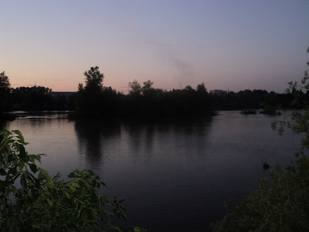 Ульба (г. Усть-Каменогорск)